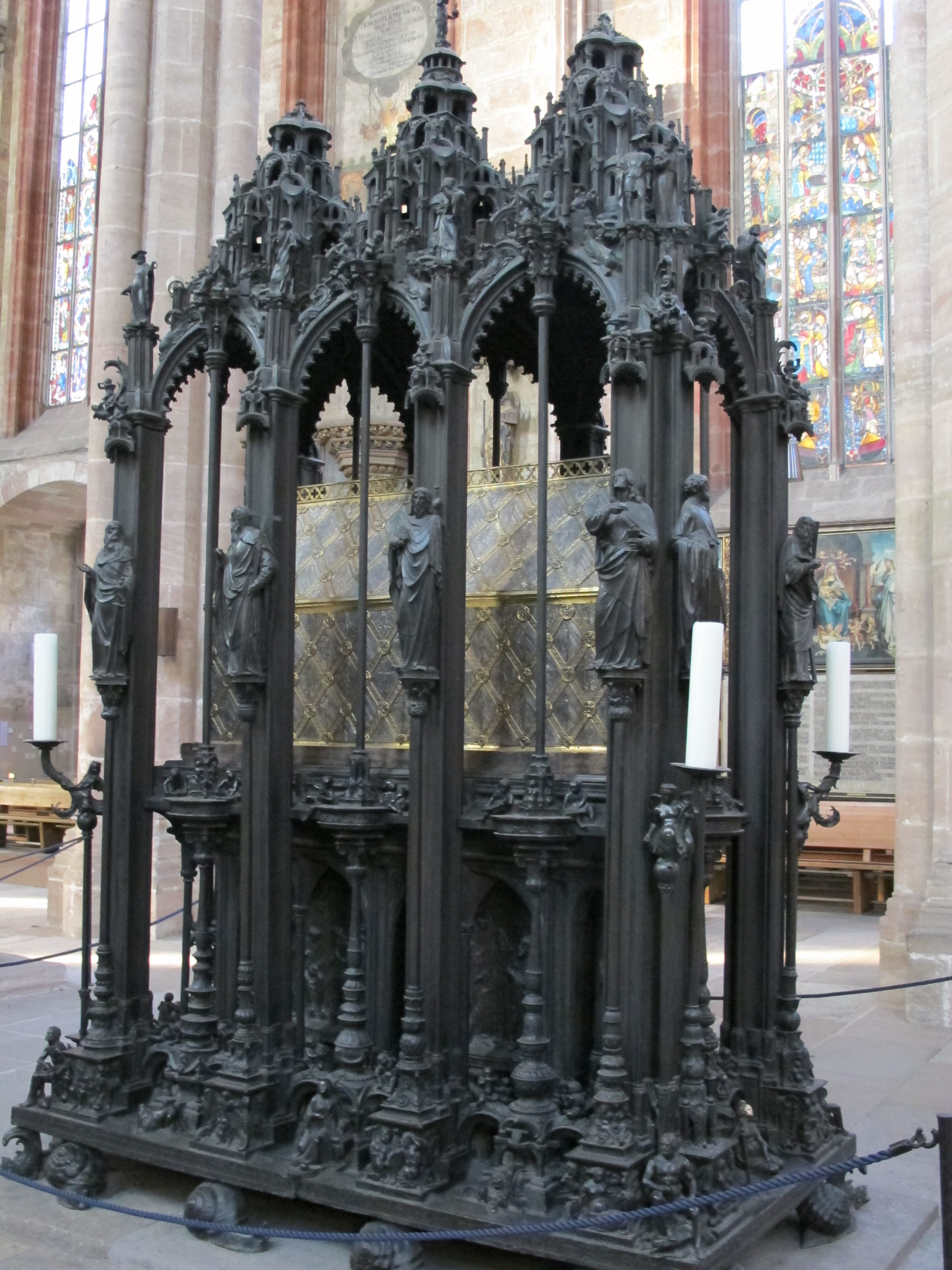 Sebaldusgrab